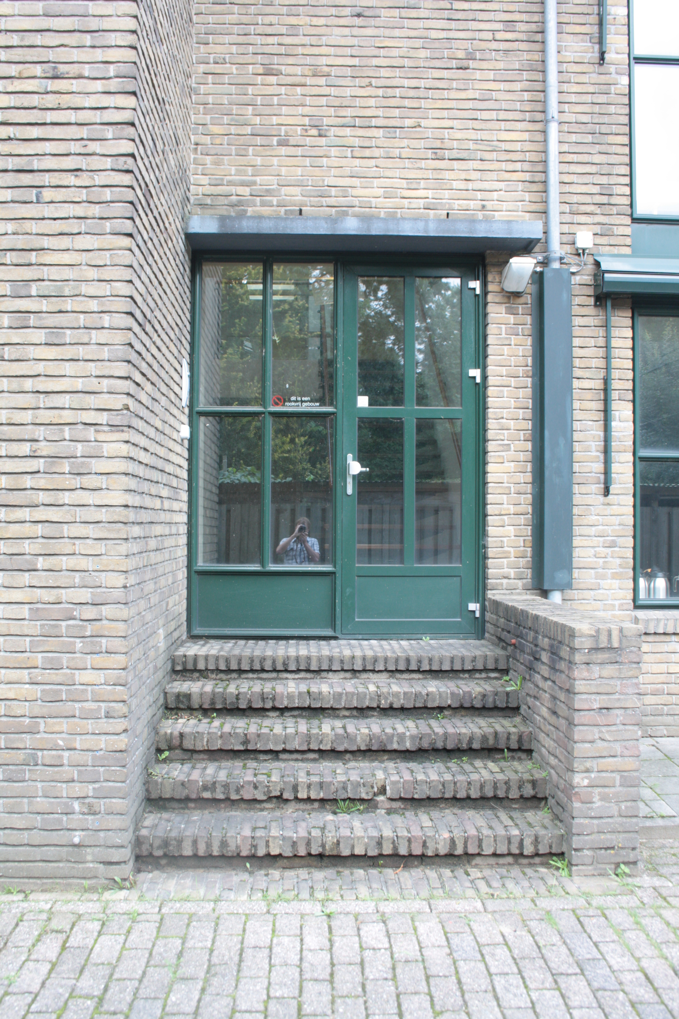 Pompstation Hogeweg. Zoek de fotograaf ;)